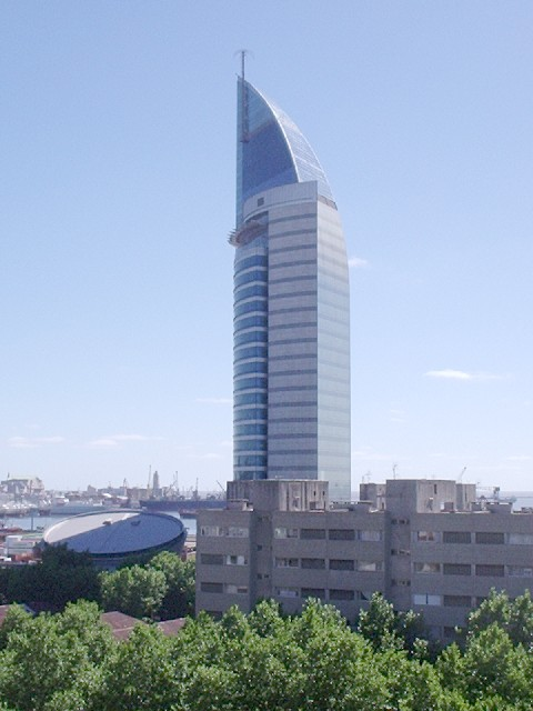 Torre de las Telecomunicaciones, Montevideo, Uruguay. Foto realizada y subida por Federico Corral (aka Shant)